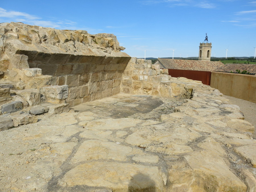 castell de Passanant, comarca de Conca de Barberà, Catalunya